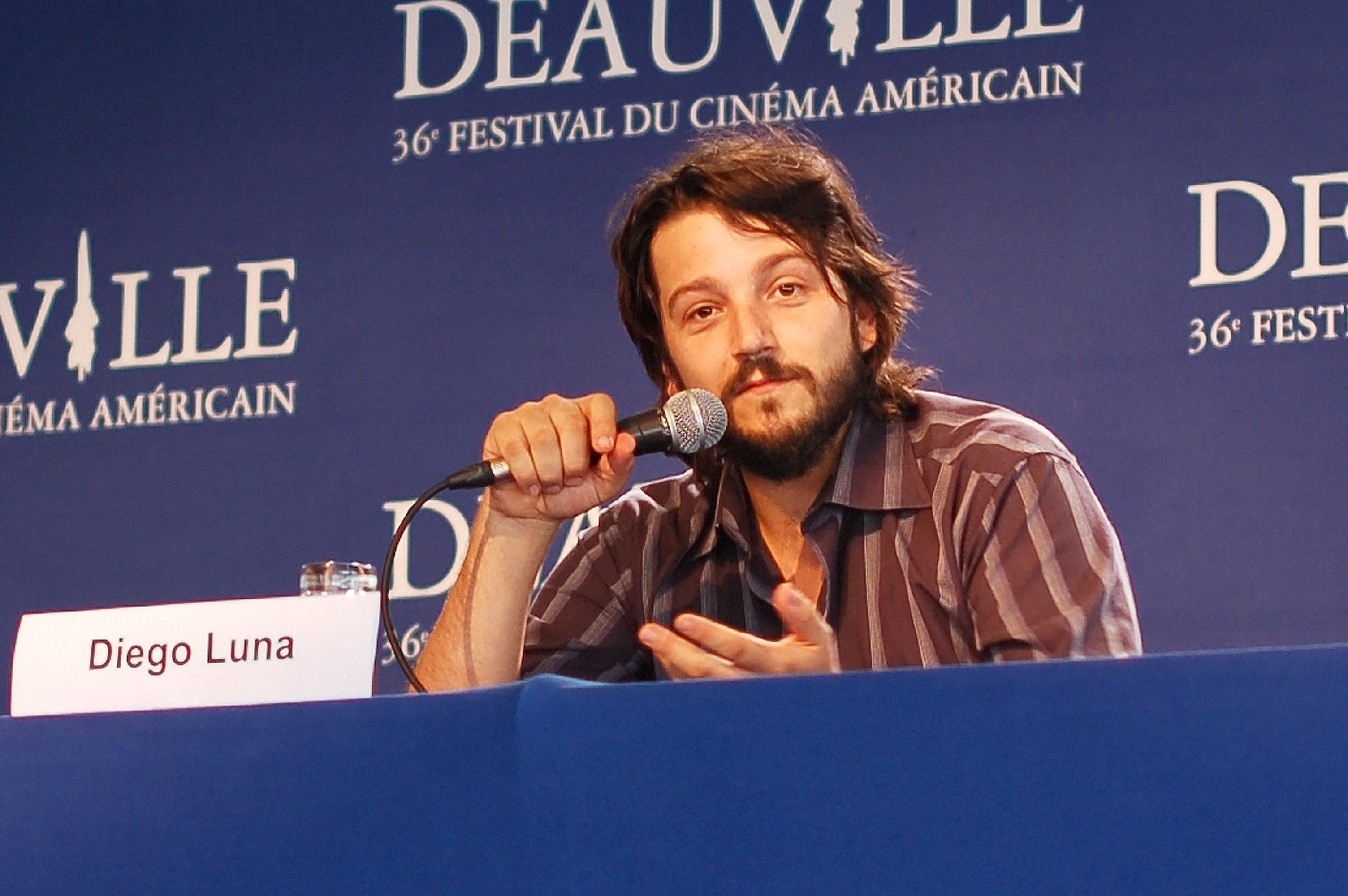 Diego Luna en conférence de presse pour la présentation de Abel au 36ème Festival du Cinéma Américain de Deauville.